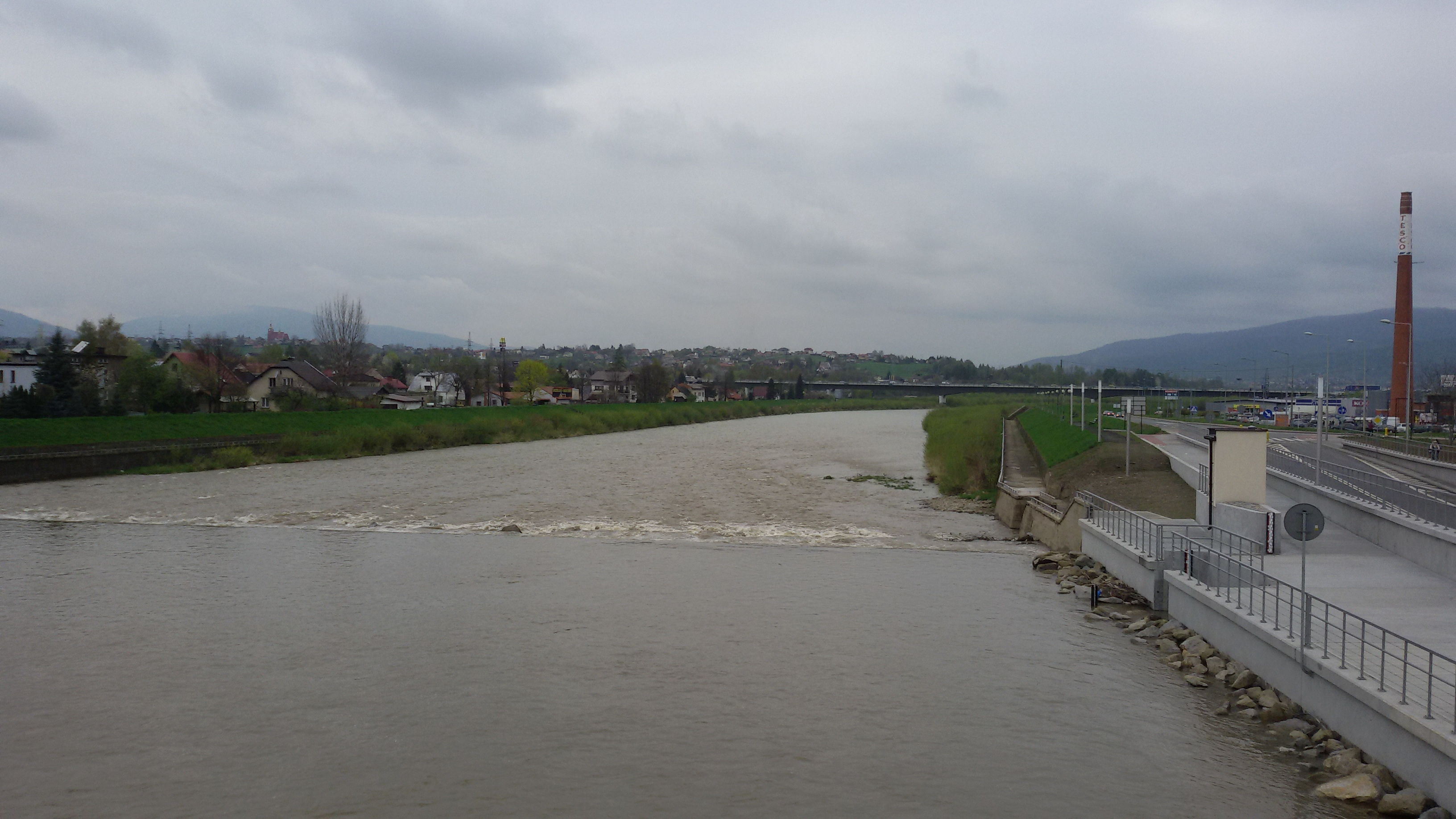 Żywiec widok na Sołę w kierunku północnym na moście przy ulicy Dworcowej